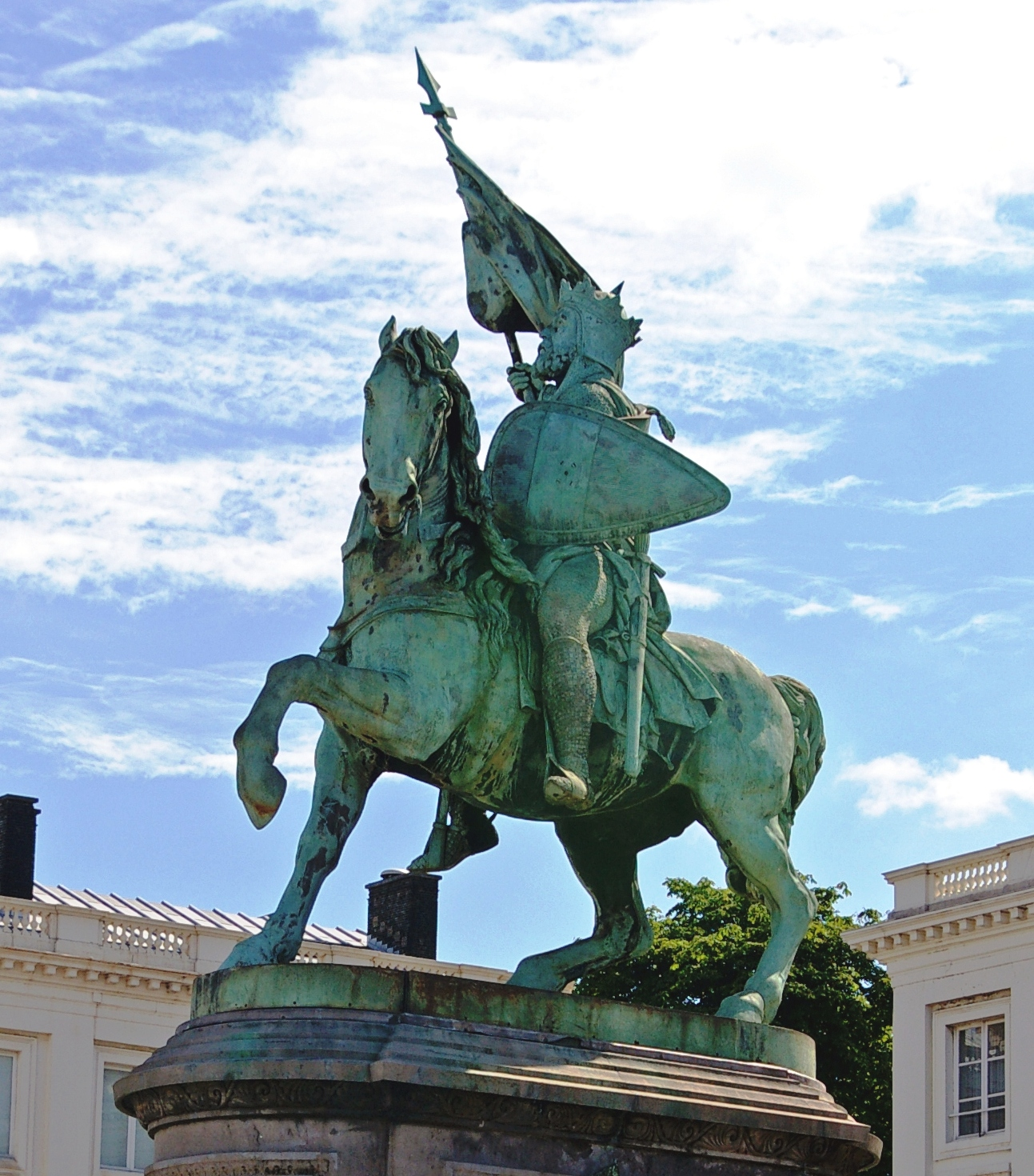 Godefroid de Bouillon (1848) par Eugène Simonis place Royale à Bruxelles